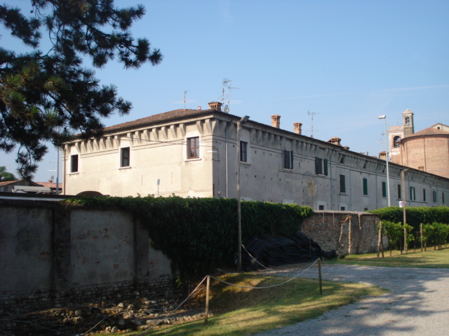 Una veduta d'angolo sulla cascina Badia Vecchia, presa dall'interno del sito archeologico di Villa Badia.